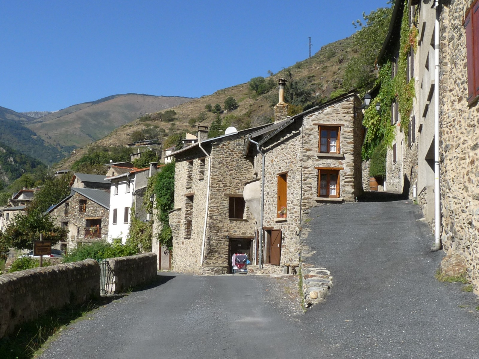 Entrée du bourg de Nohèdes, Pyrénées-Orientales, France